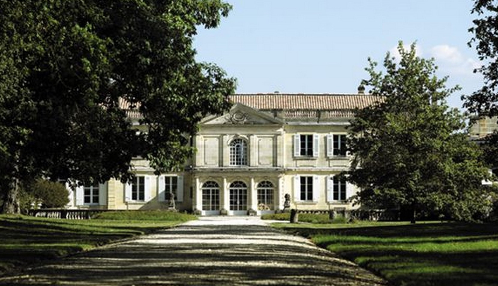 Le château du Taillan vue de l'entrée principale